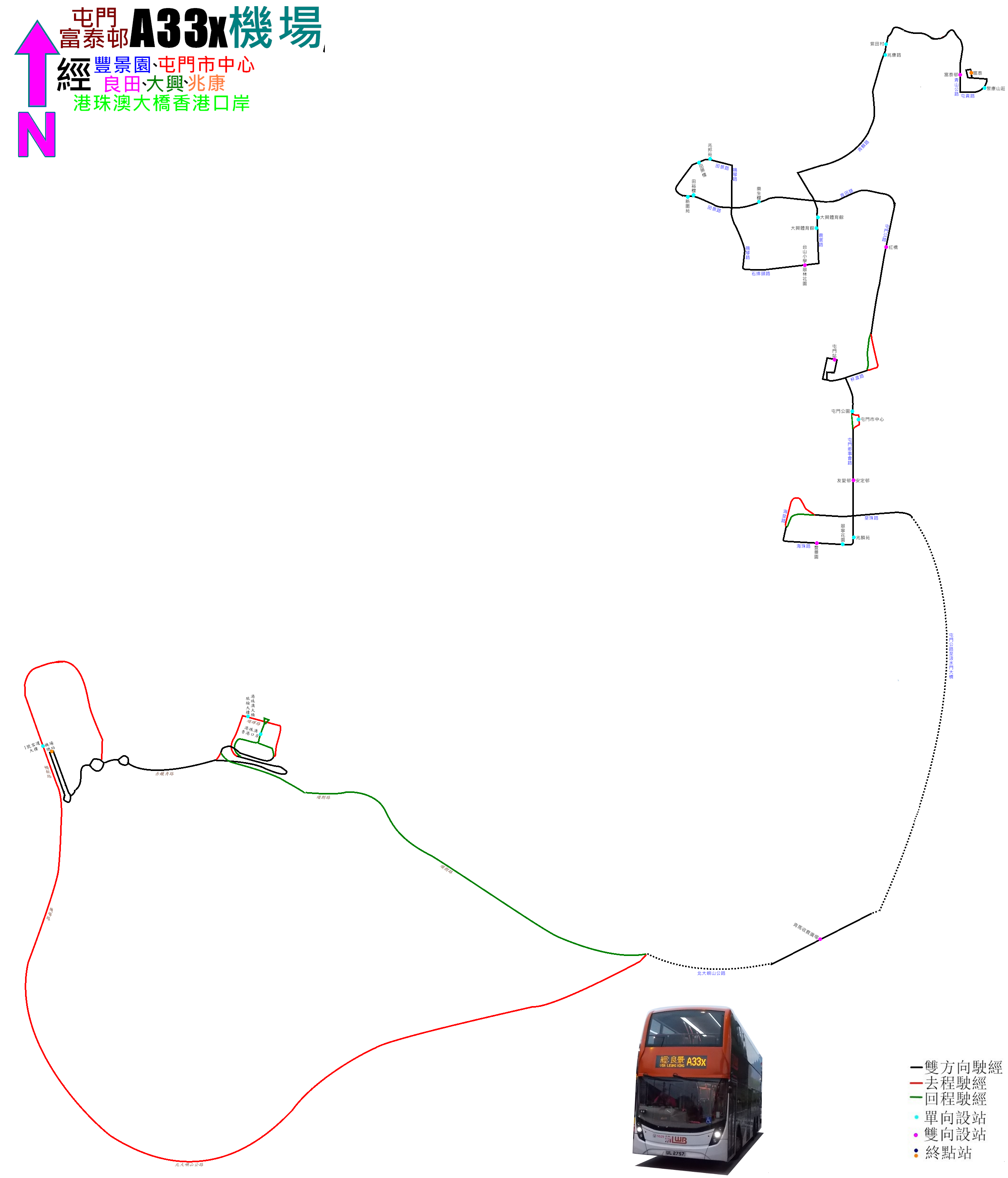 龍運巴士A33X線的走線圖